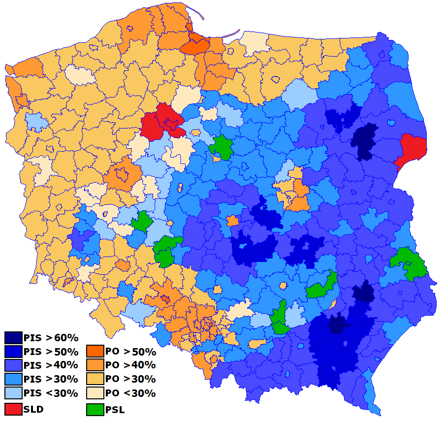 Wybory do Parlamentu Europejskiego w Polsce w 2014 roku - kolor oznacza partię, która uzyskała największą liczbę głosów w powiecie; odcień koloru pokazuje jaki procent głosów ta zwycięska partia uzyskała